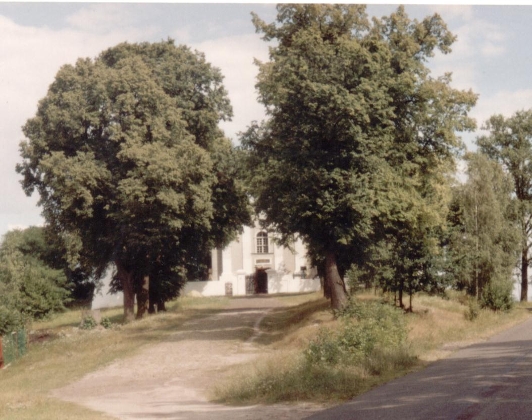 Babsk - kościół parafialny pw. św. Antoniego Padewskiego, mur., pocz. XIX w. (zabytek nr 193/256 z 27.12.1967)